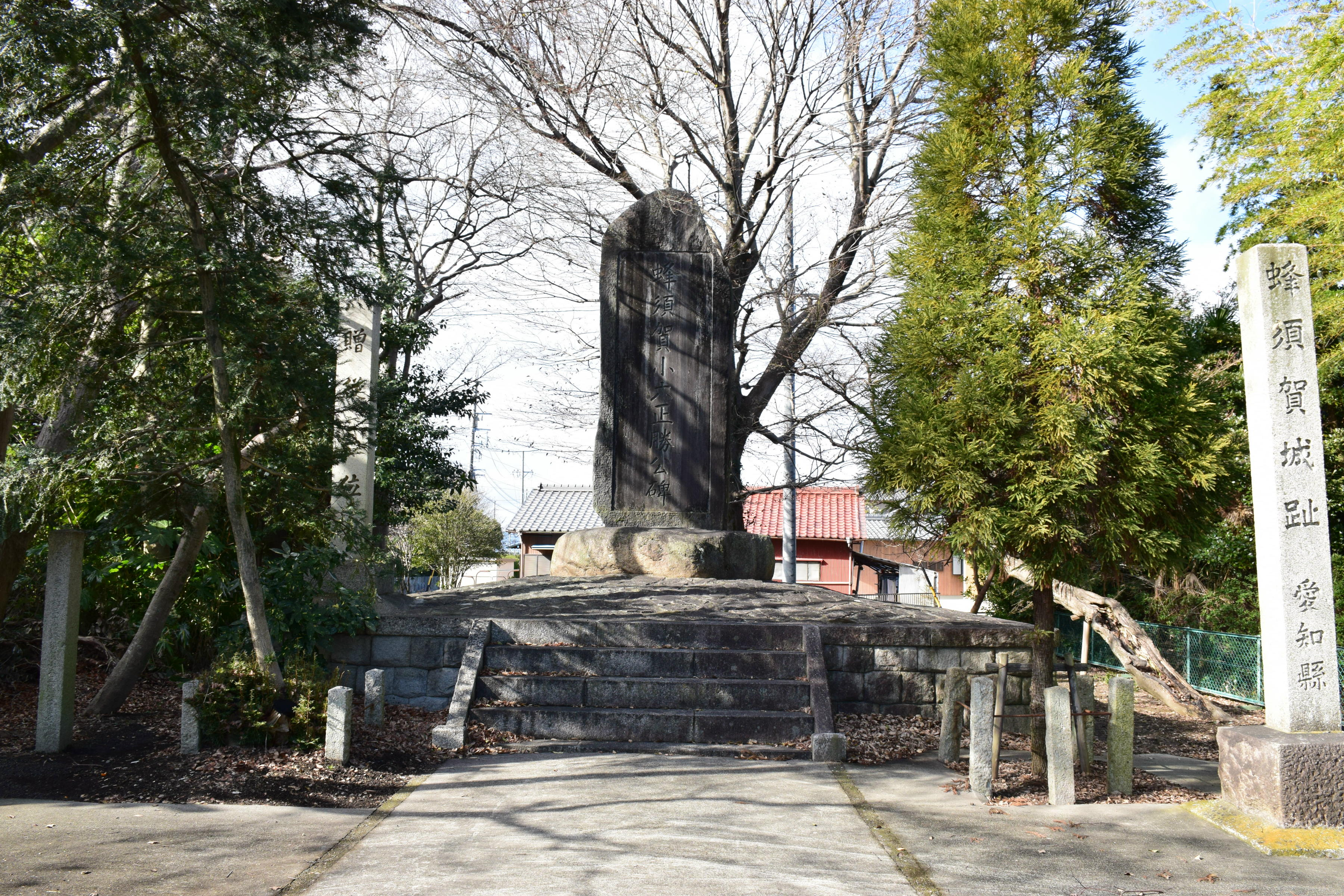 蜂須賀城址